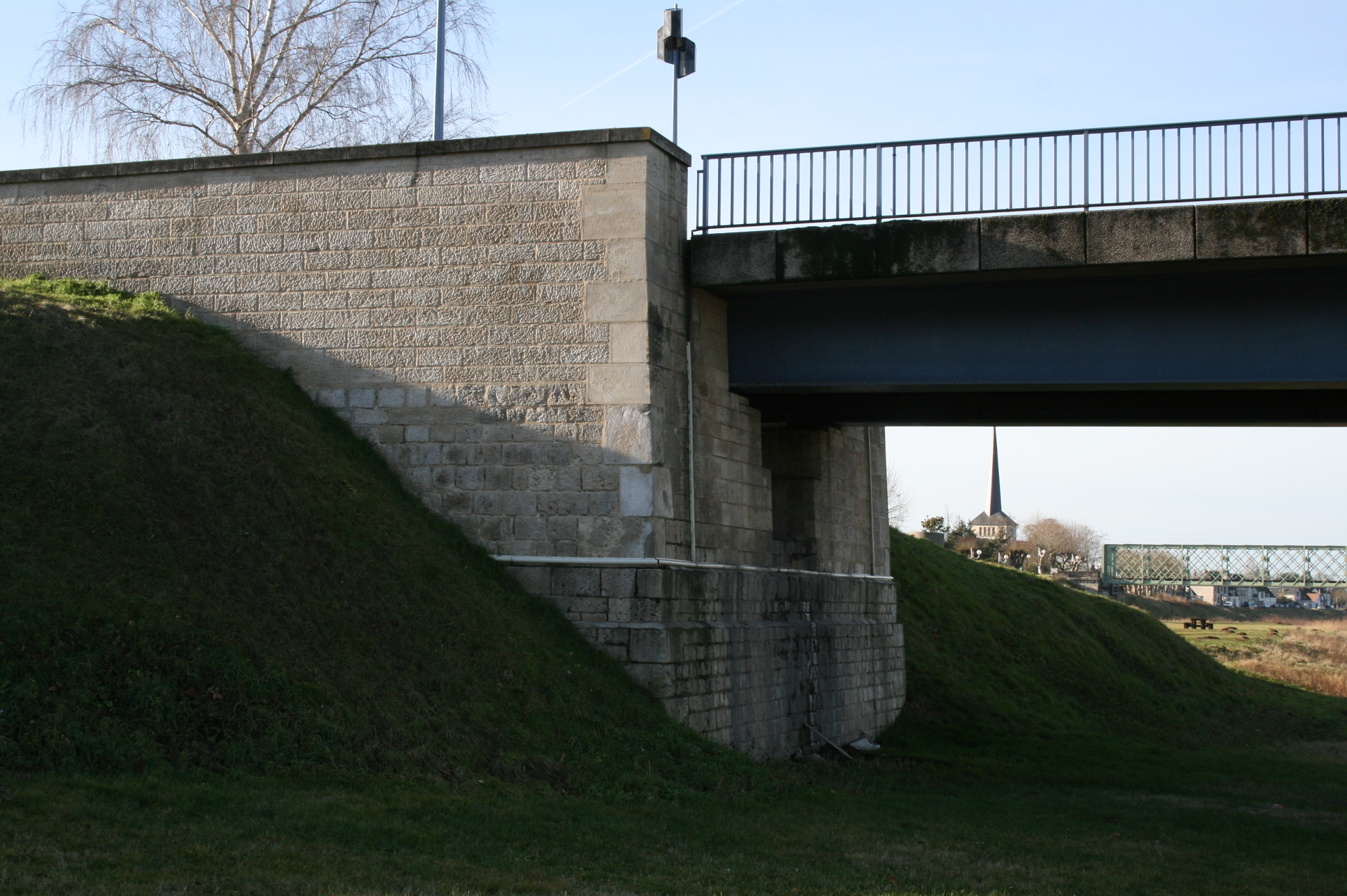 Pont de Sully-sur-Loire (Loiret - France)